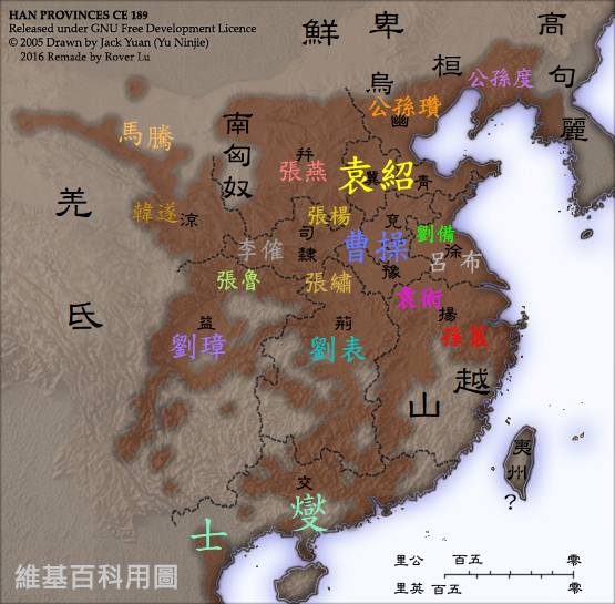 東漢末期197至198年群雄勢力分布圖